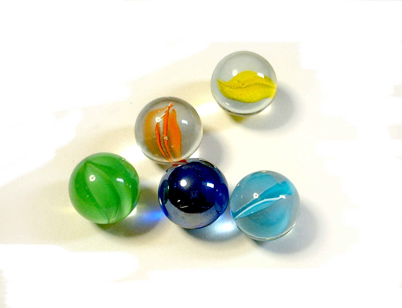 Bi-dama. Photo taken in Tokyo Japan.